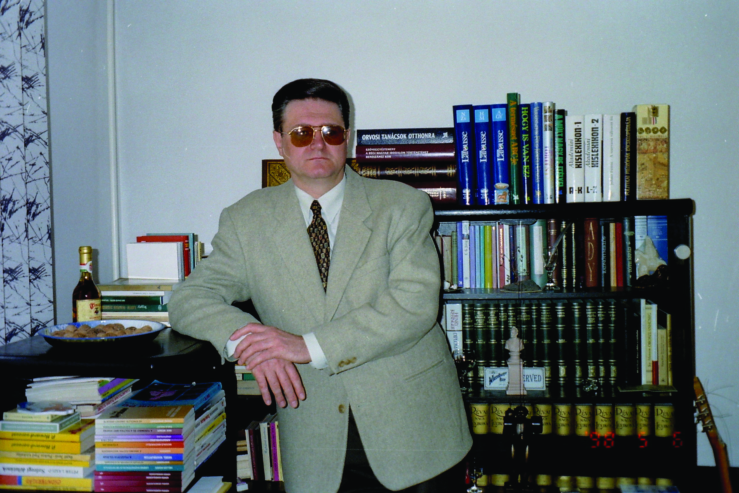 Szegedi áruháztulsajdonosként